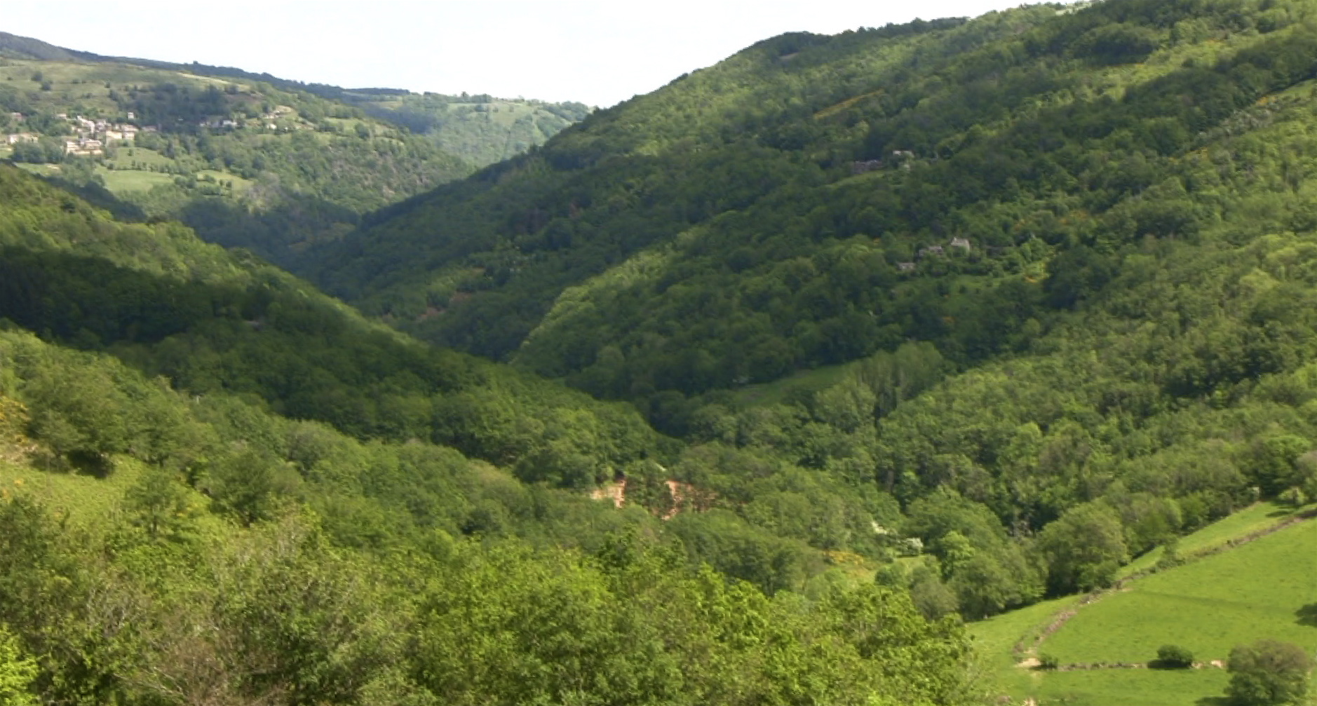 Partie de la vallée du_Lot en amont de Pomayrols classée Espace Naturel Sensible.